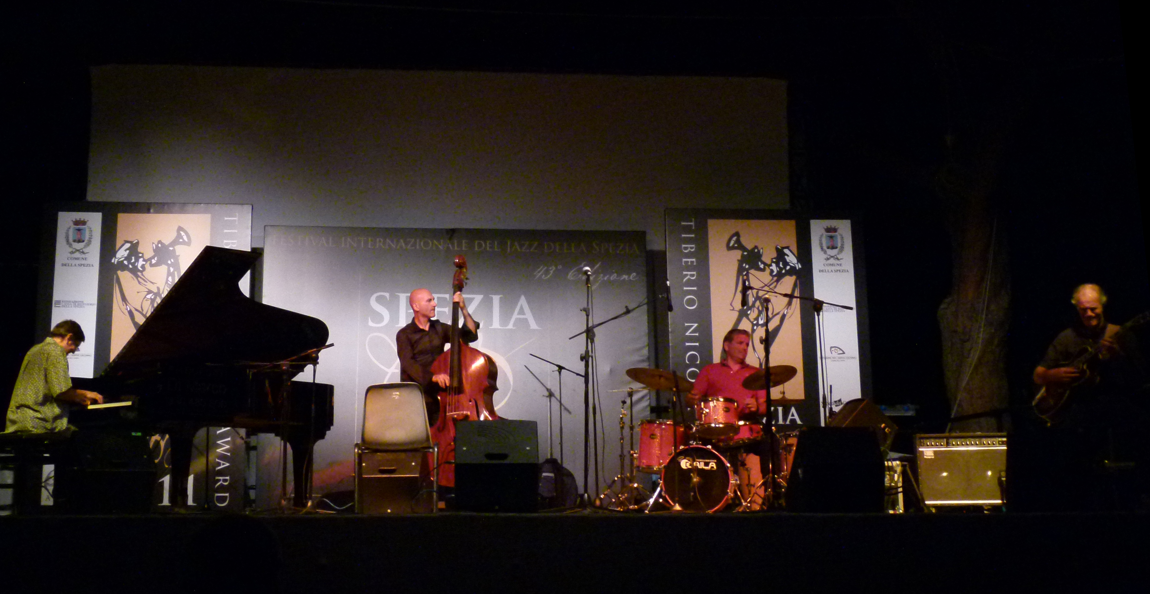 43 edizione del Festival Internazionale del Jazz della Spezia